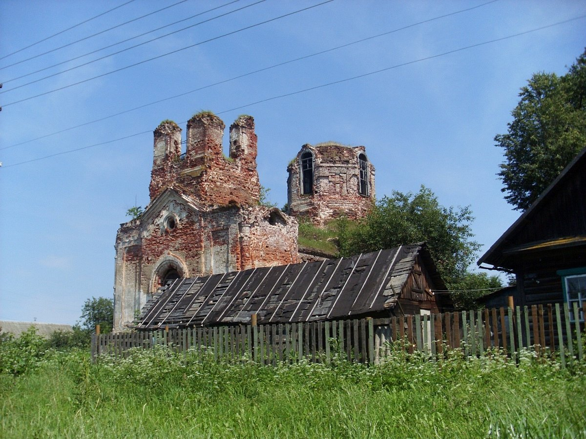 Межава. Свята-Васкрасенская царква